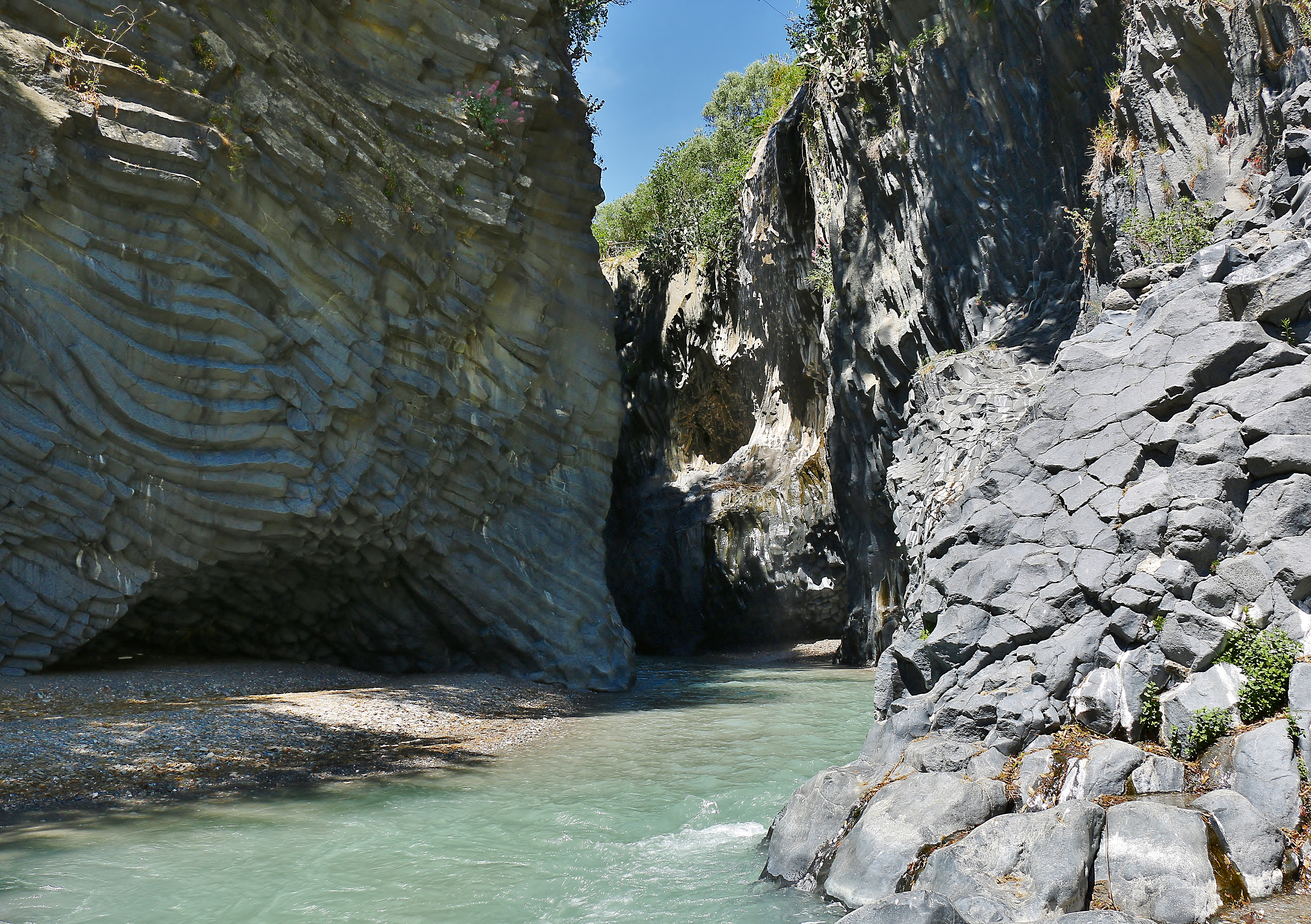 Parco fluviale dell'Alcantara This is a photo of a monument which is part of cultural heritage of Italy.